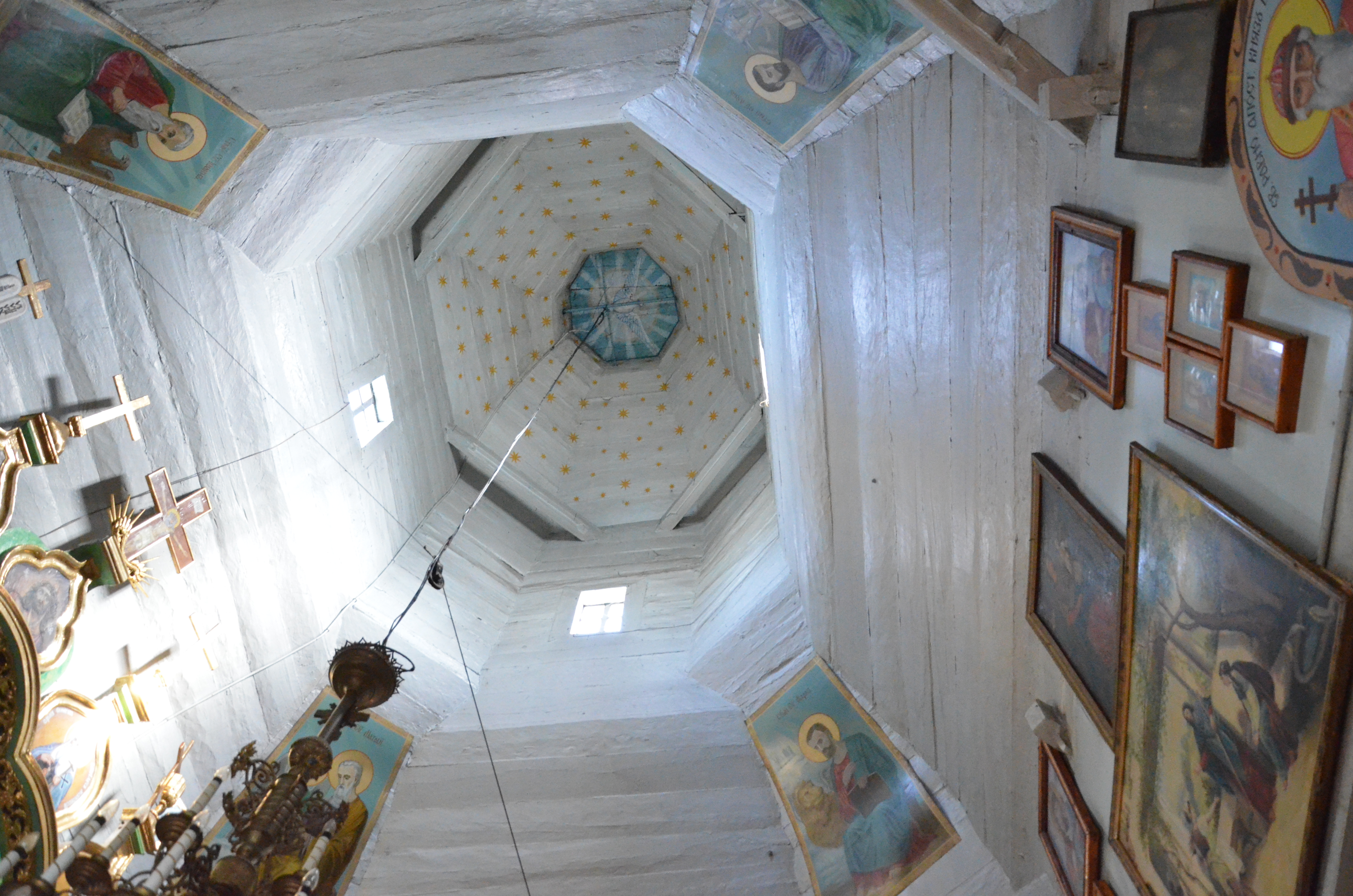 Миколаївська церква (дер.), село Синява